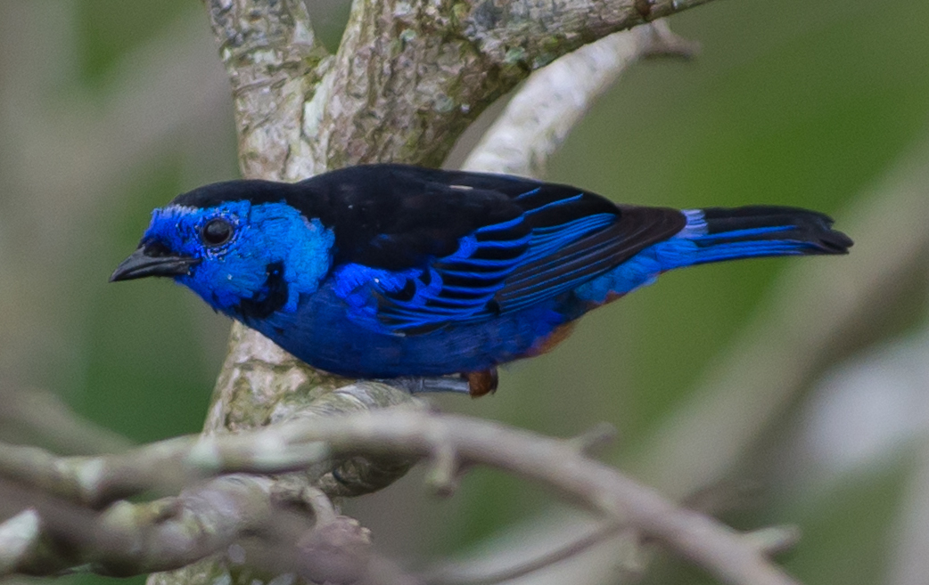 Tangara velia Opal-rumped Tanager